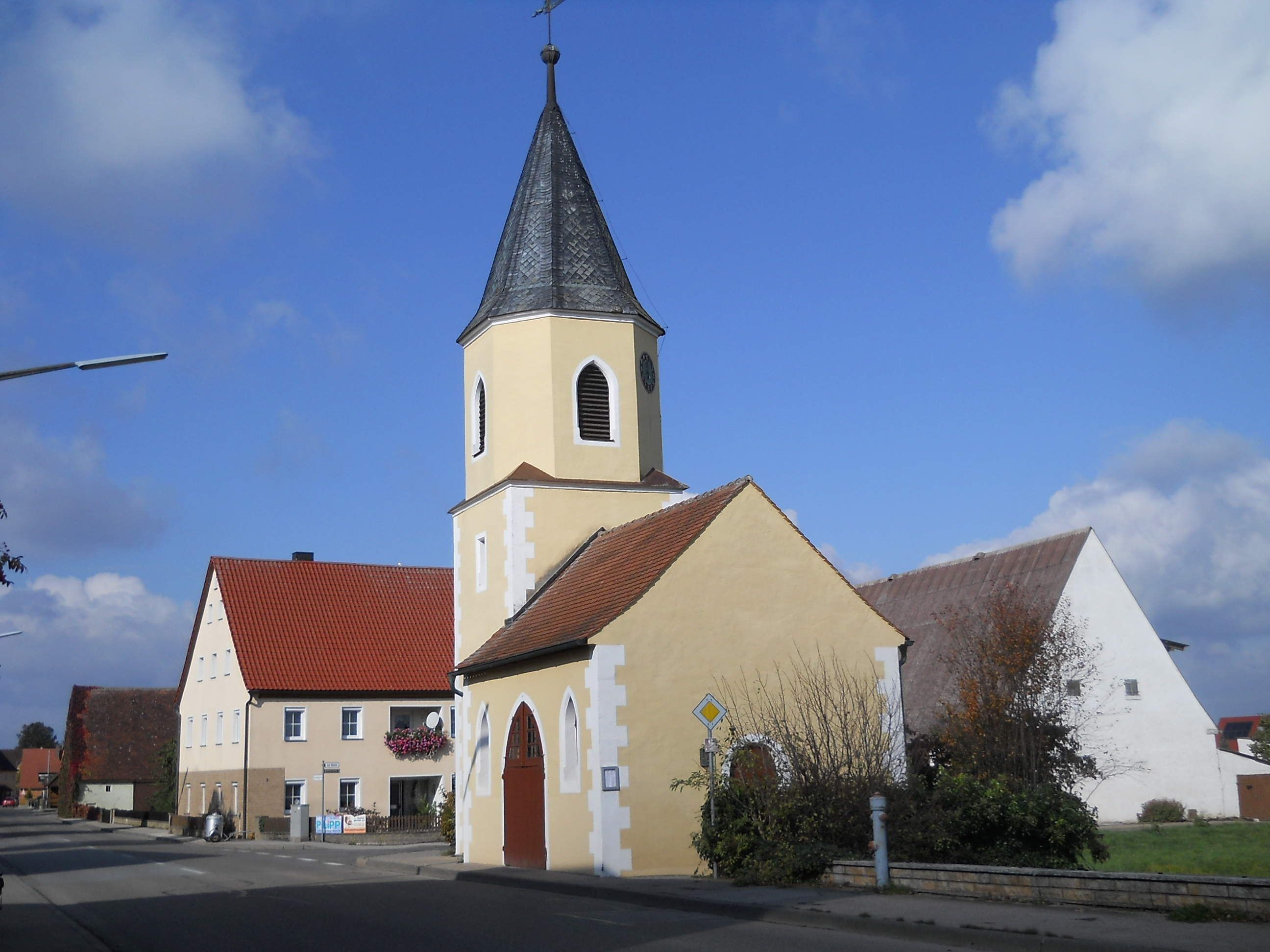 Frickenfelden, Ortsteil von Gunzenhausen im mittelfränkischen Landkreis Weißenburg-Gunzenhausen (Bayern), Glockenturm von 1880 mit Anbau (heute Kapelle)